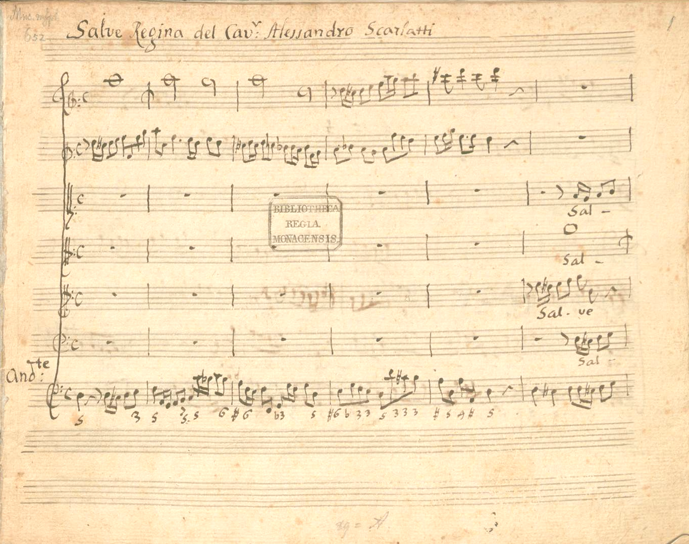 Première page d'une copie du XIXe siècle du Salve Regina [II] R.528.10 d'Alessandro Scarlatti, composé vers 1706.